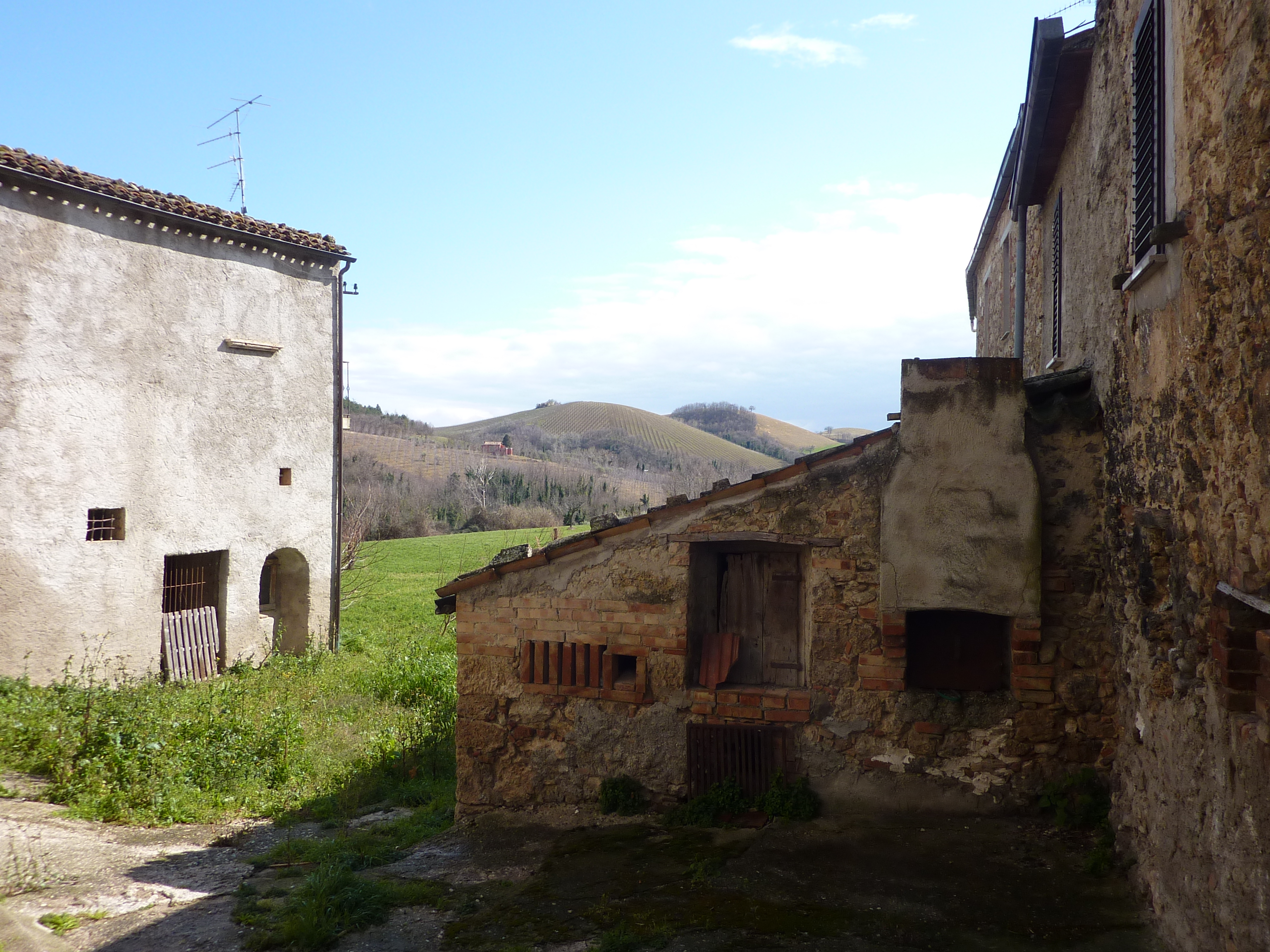 un tempo ogni famiglia di Rocca Ceppino cuoceva il pane a turno nel forno comunitario